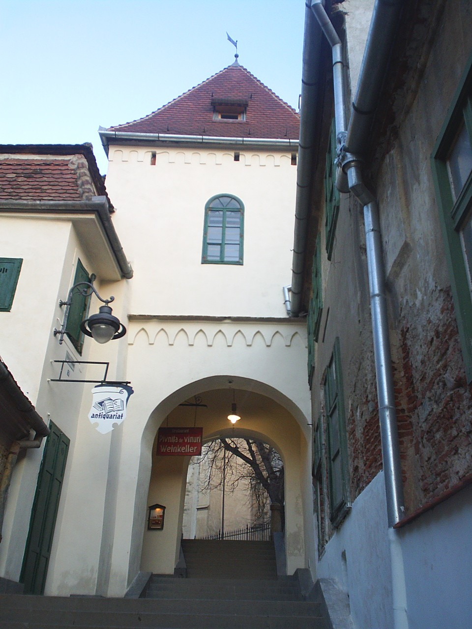 Sibiu (Hermannstadt), Tour de l'Escalier (Sagturm, Turnul Scarilor).